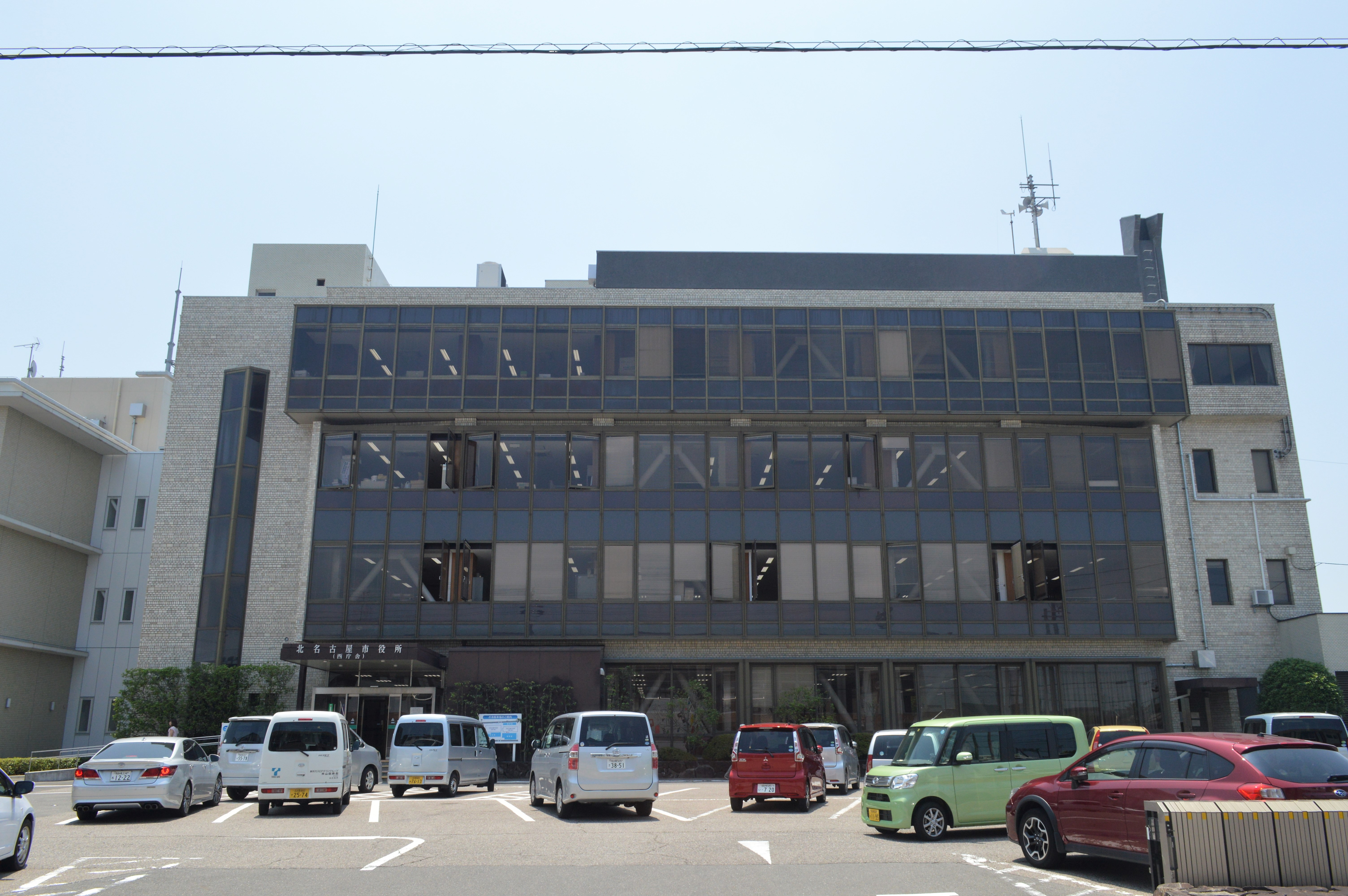 愛知県北名古屋市にある北名古屋市役所西庁舎。